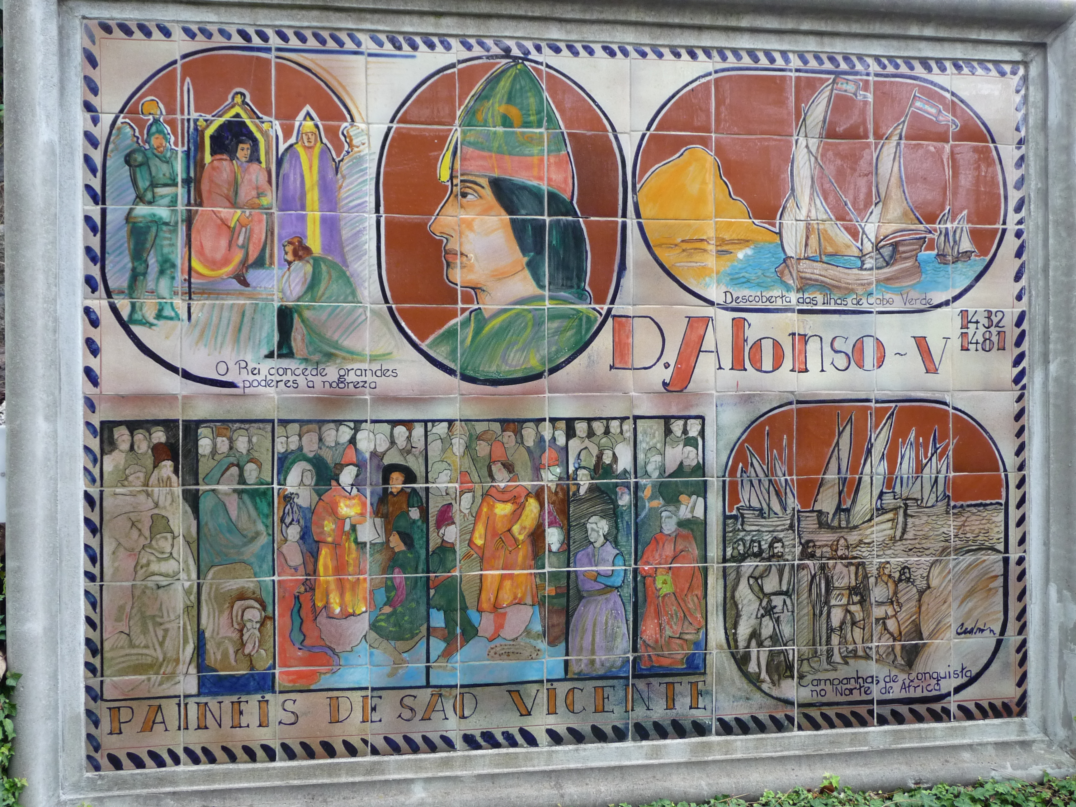 V. Alfonz portugál király uralkodásának fő eseményei (Madeira, Monte, Trópusi Kert) — azulejo:1. a király nagy jogokat ad a nemességnek;2. a Zöld-foki szigetek felfedezése;3. São Vicente-sziget betelepítése;4. hódító hadjárat Észak-Afrikában